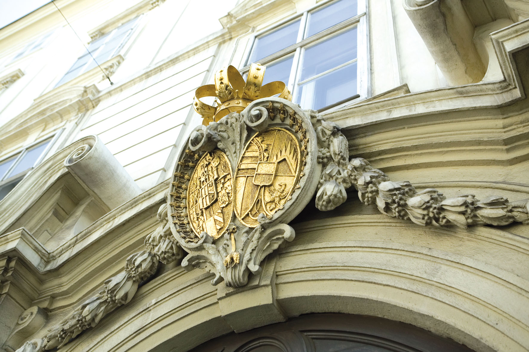 Kaiserliches Wappen am Eingang der Diplomatischen Akademie Wien